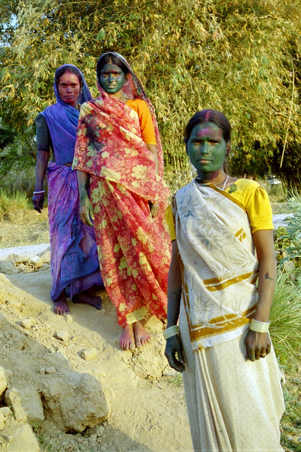 Frauen am indische Frühlingsfest "Holi". Die Gesichter der Frauen sind, wie an diesem Tag üblich, bunt gefärbt.